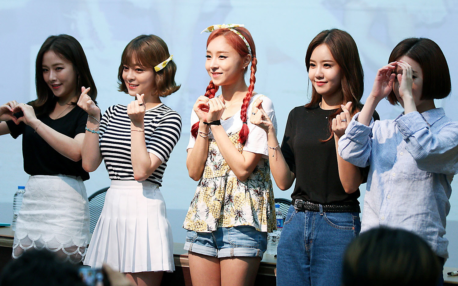 150628 북리브로 홍대점 트랜디 팬사인회